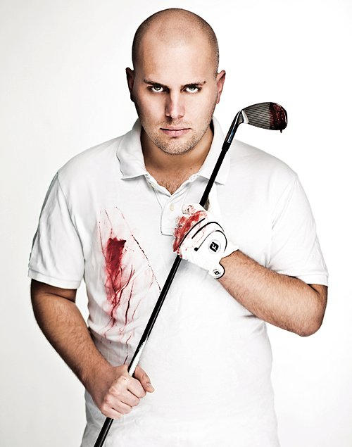 Favorite im Jahr 2011